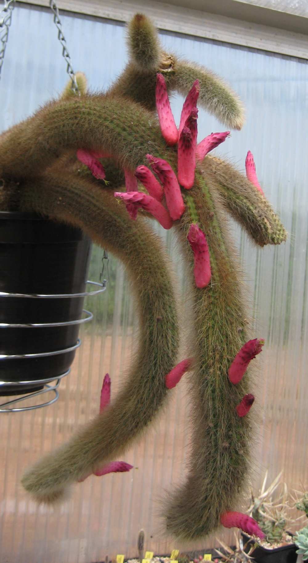 Cleistocactus brookeae subsp. vulpis-cauda